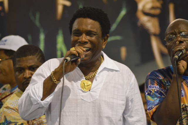 Neguinho da Beija-Flor em 2014